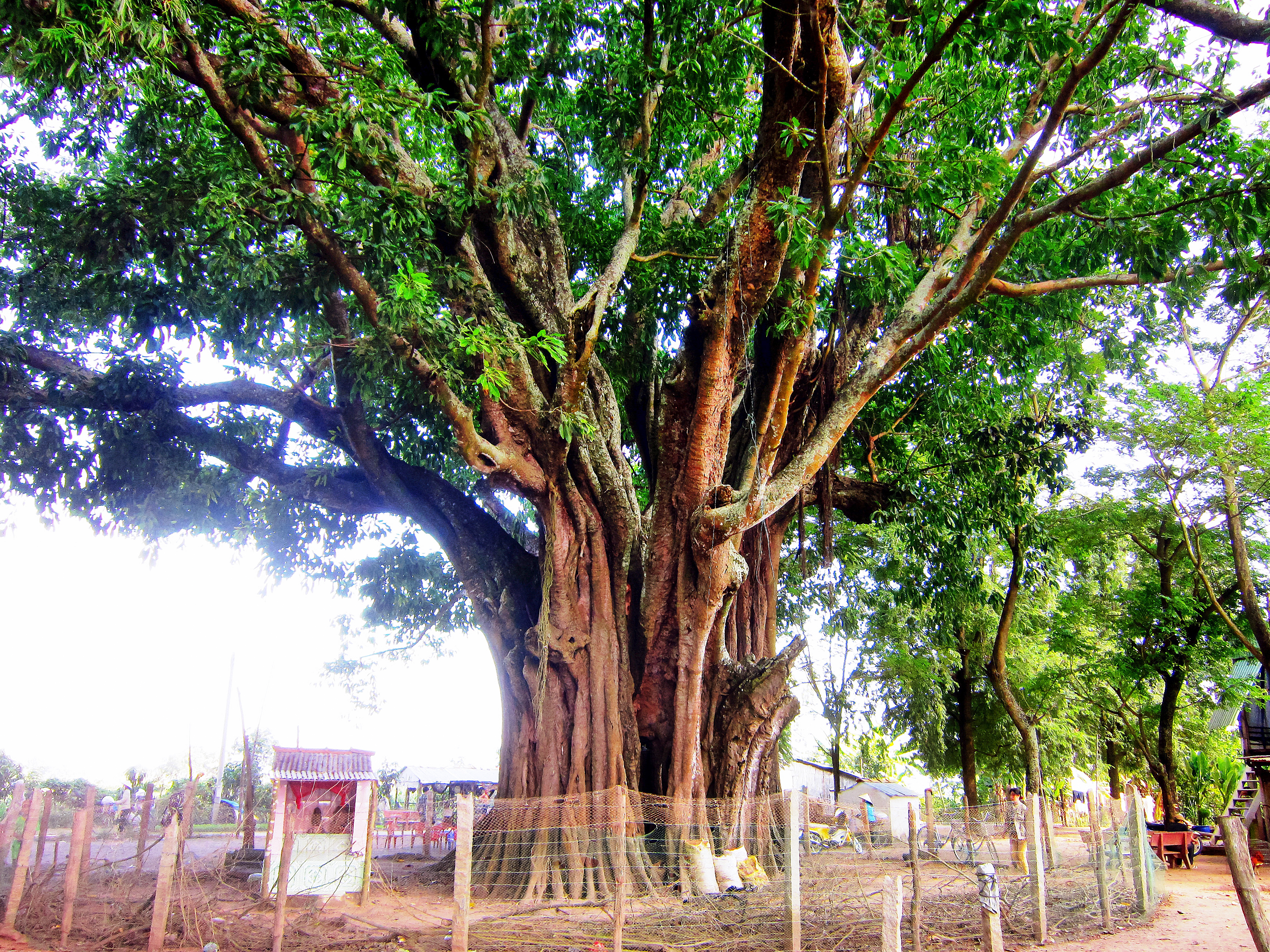 Tại huyện An Phú (An Giang, Việt Nam) hiện có một cây đa cao khoảng 30m, chu vi thân ở phần gần gốc là 26, 8m. Năm 2005, sau khi lấy mẫu giám định, ngành chức năng đã xác định độ tuổi của cây là trên 340 năm, và đây là cây đa lâu năm nhất của tỉnh.